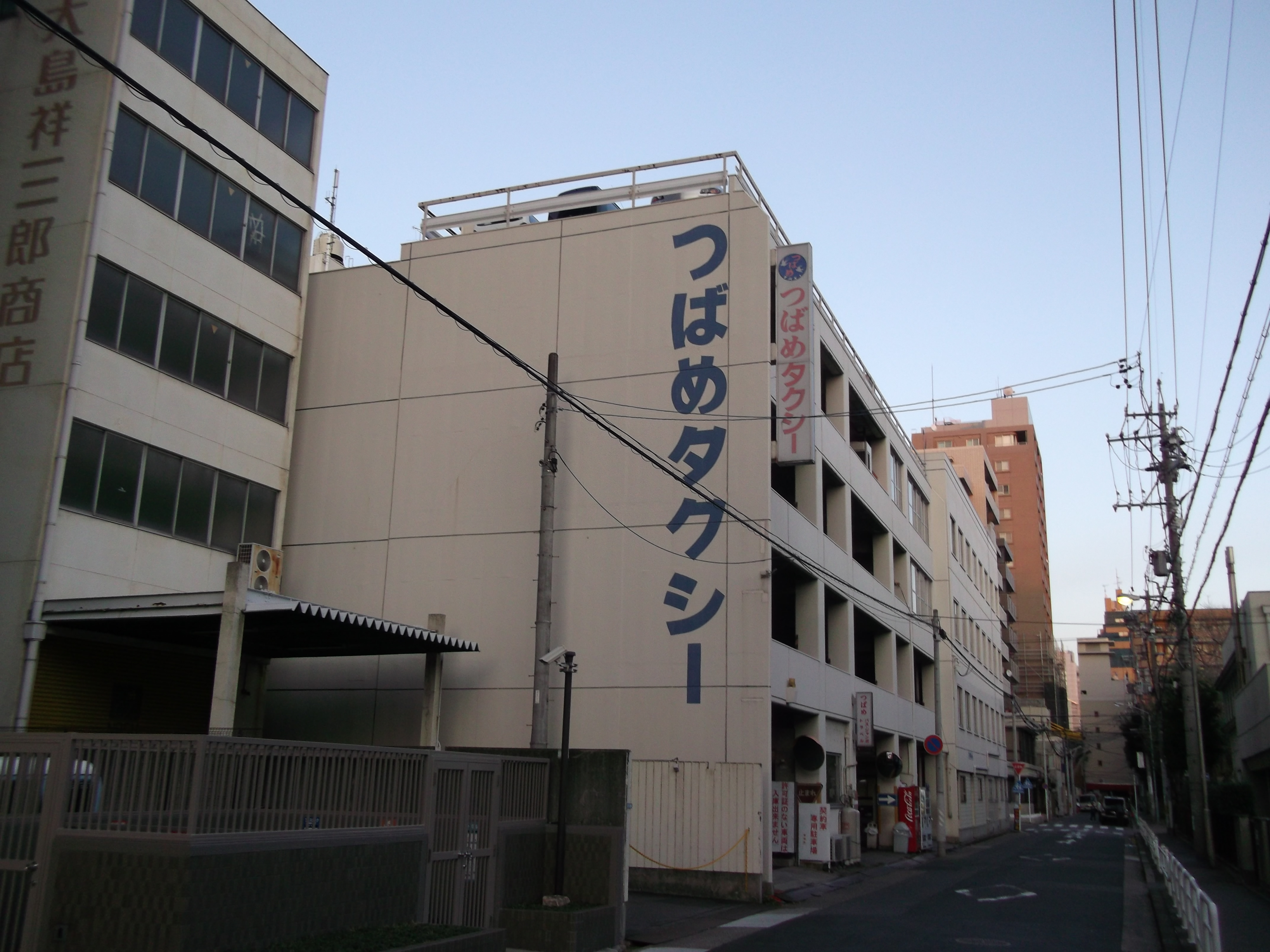 名古屋市中区栄にあるつばめ自動車本社を南西角から写す